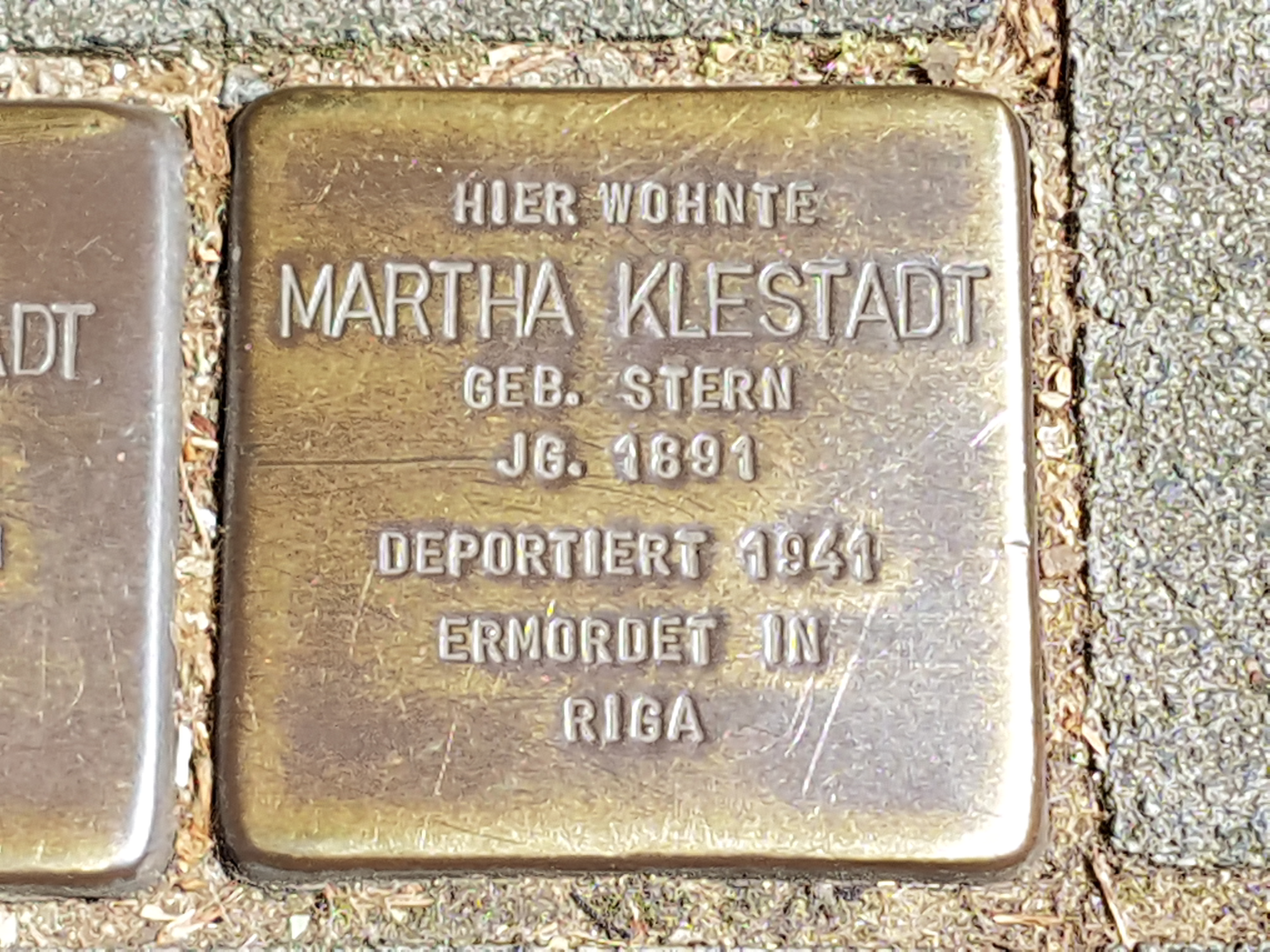 Stolperstein Duisburg